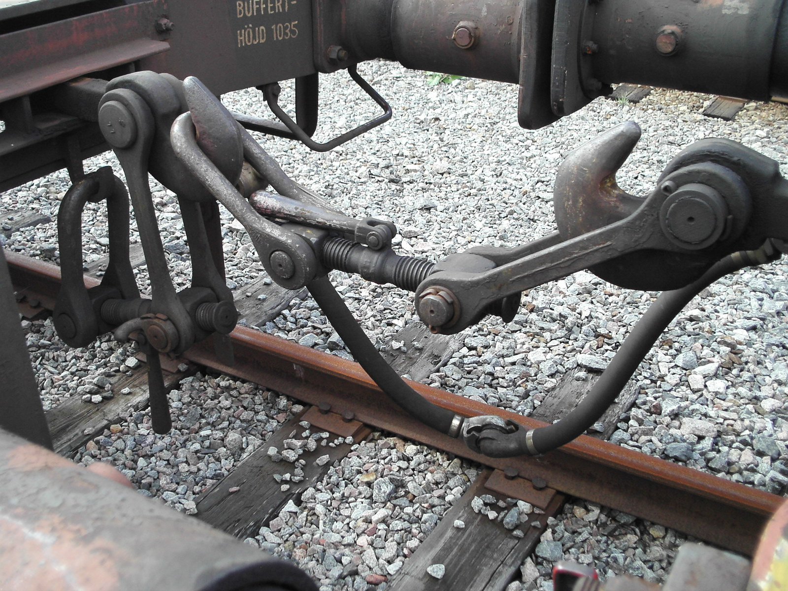 Skruvkoppel och bromsslangar